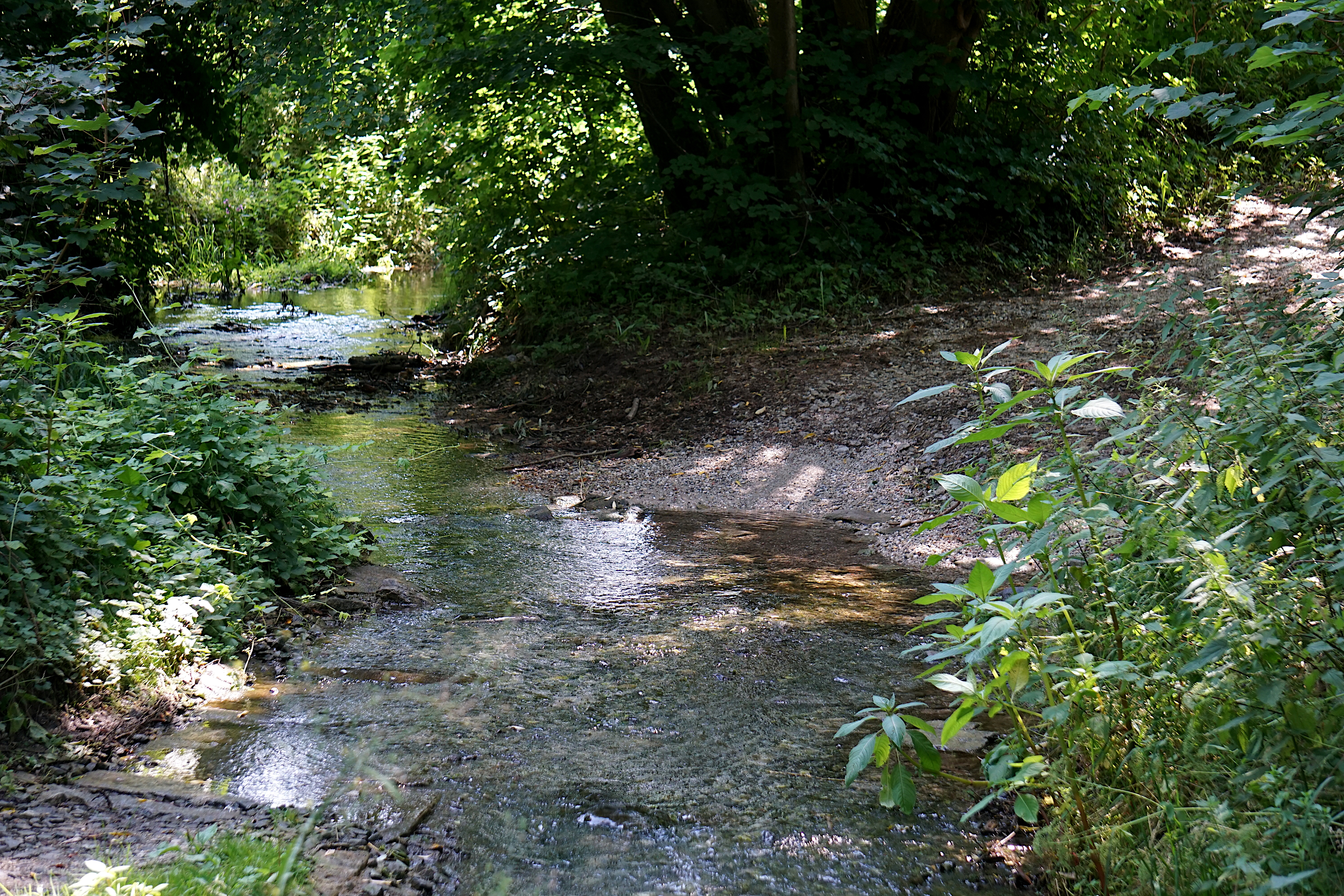 Das Schweinbachtal ist ein typisches asymmetrisches Tal mit einer Geländeform, wie sie im Tertiärhügelland vor allem an Nord-Süd gerichteten Taleinschnitten häufig auftritt. Bedingt durch die periglaziale Überprägung ist der Talquerschnitt deutlich asymmetrisch mit flachen nach Nordost exponierten Hängen und steilen nach Südwest geneigten Talflanken. Im unteren Talabschnitt ist die ursprüngliche Morphologie durch anthropogene Beeinflussung (Bebauung, Wasser- und Wegebau) verändert.